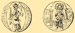 Štěpán Kotromanič- otec Alžběty Bosenské